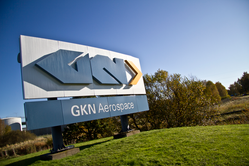 GKNs skylt vid infarten till Stallbacka i Trollhättan